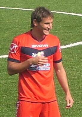 Bergessio al centro sportivo Torre del Grifo Village